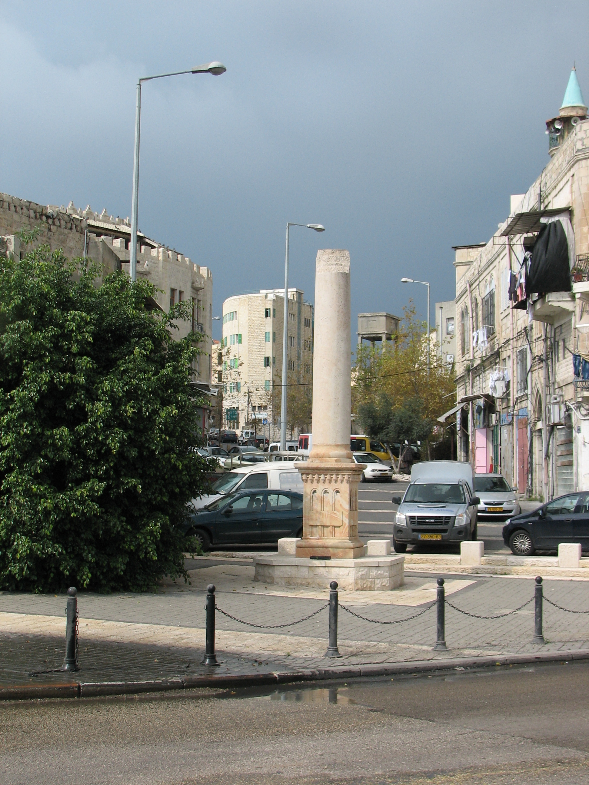 faisal 1 of iraq square in Downtown Haifa כיכר פייסל שהוקמה לזכרו של פייסל הראשו מלך עירק שנפטר בשוויץ ב-1933 וגופתו הועברה דרך נמל חיפה.